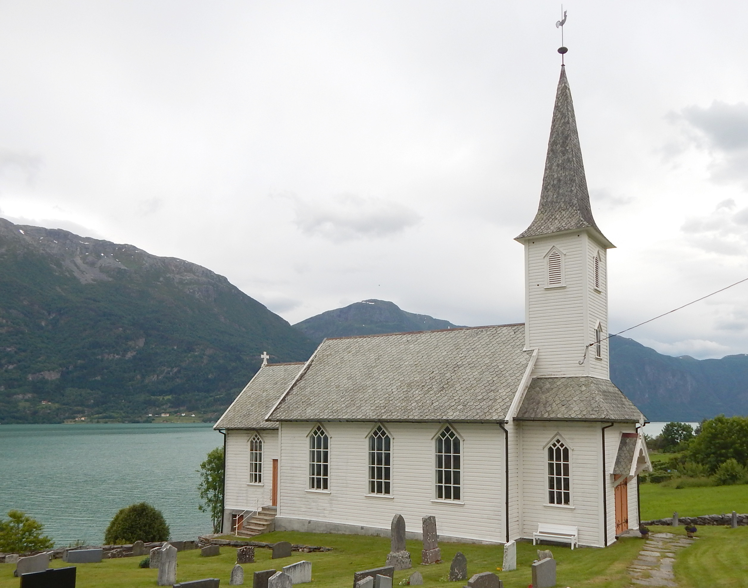 Nes kirke i Luster